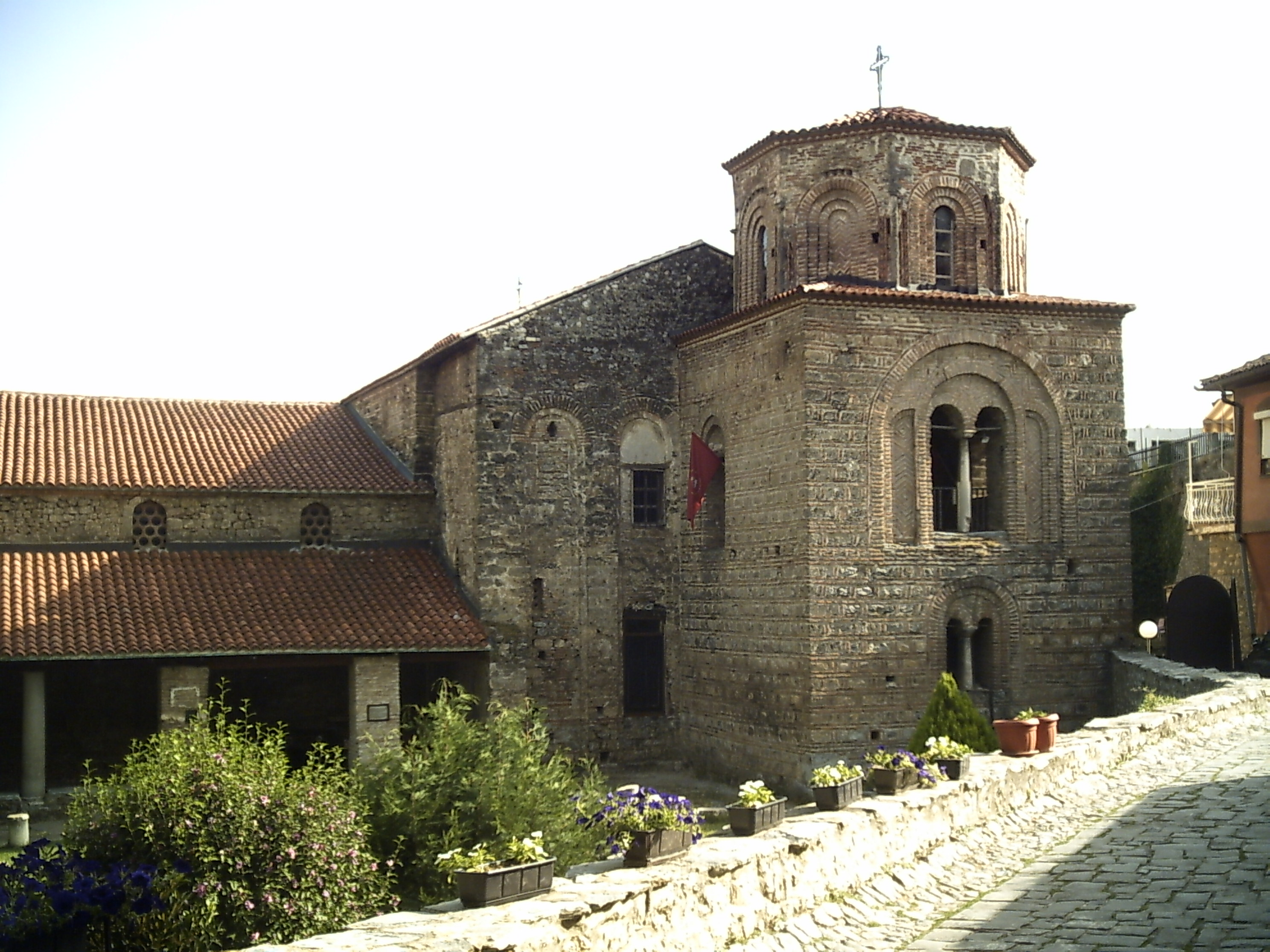 Ohridi Szent Szófia-templom (Macedónia)